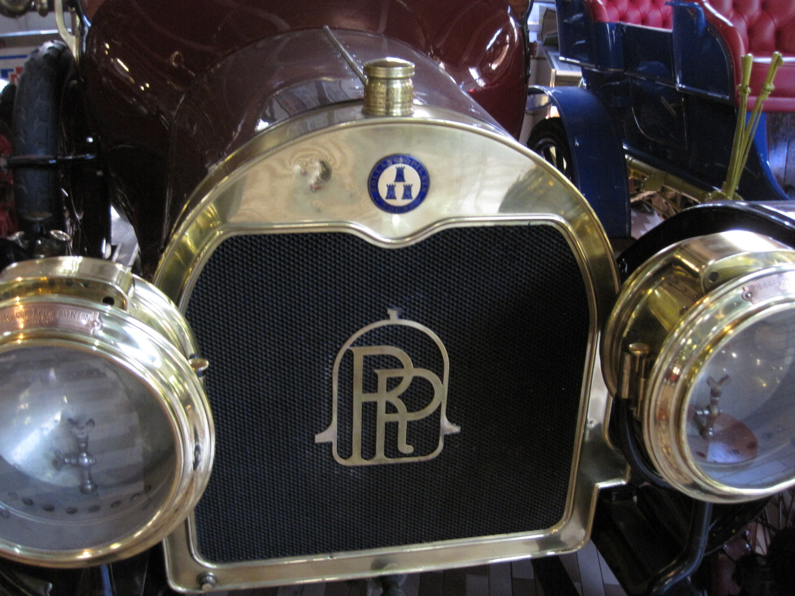 Automobiles in Panini Maserati Museum in Modène